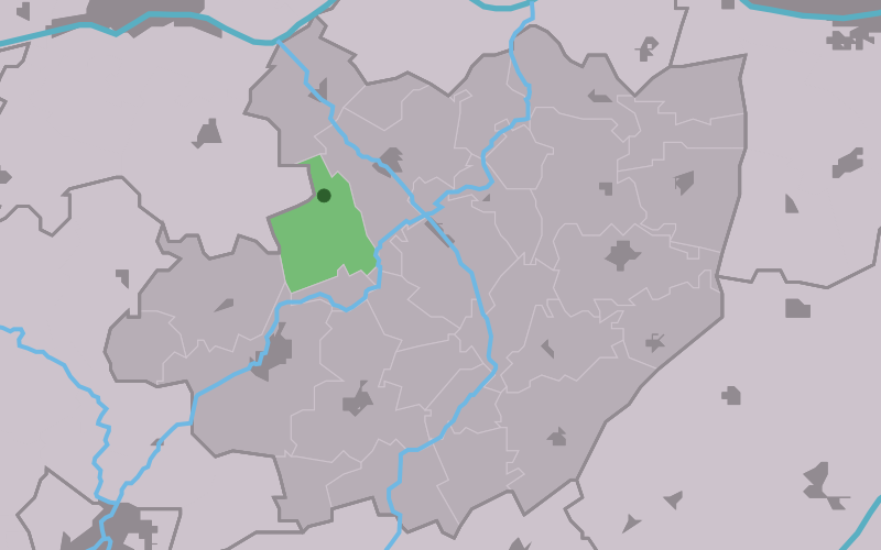 Kaartsje fan himrik fan Spannum